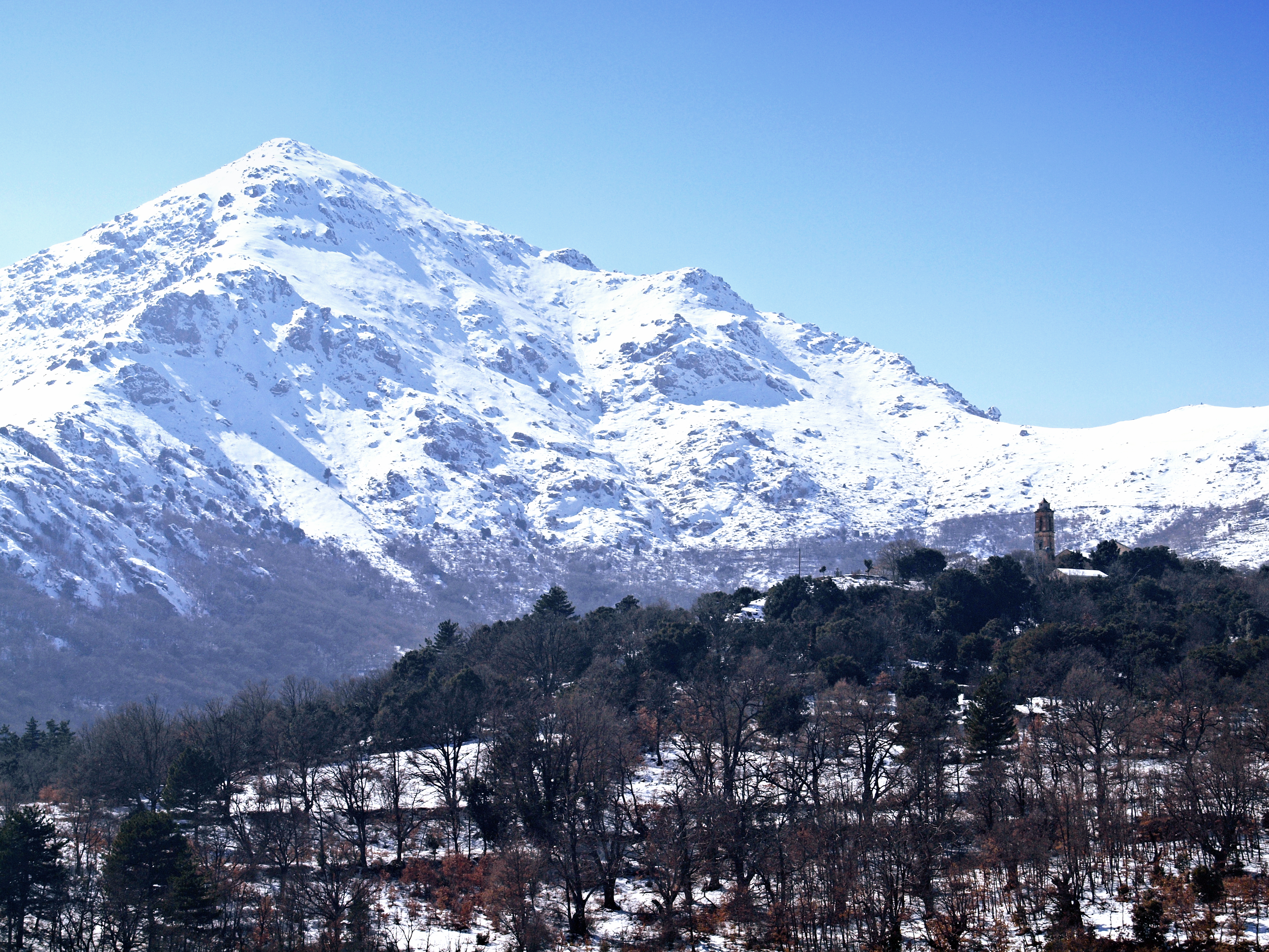 Pioggiola (Corsica) - Le San Parteo (1630 m)